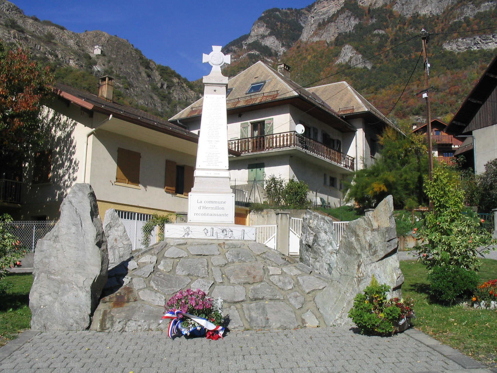 Monument aux morts d'Hermillon (Savoie, France)